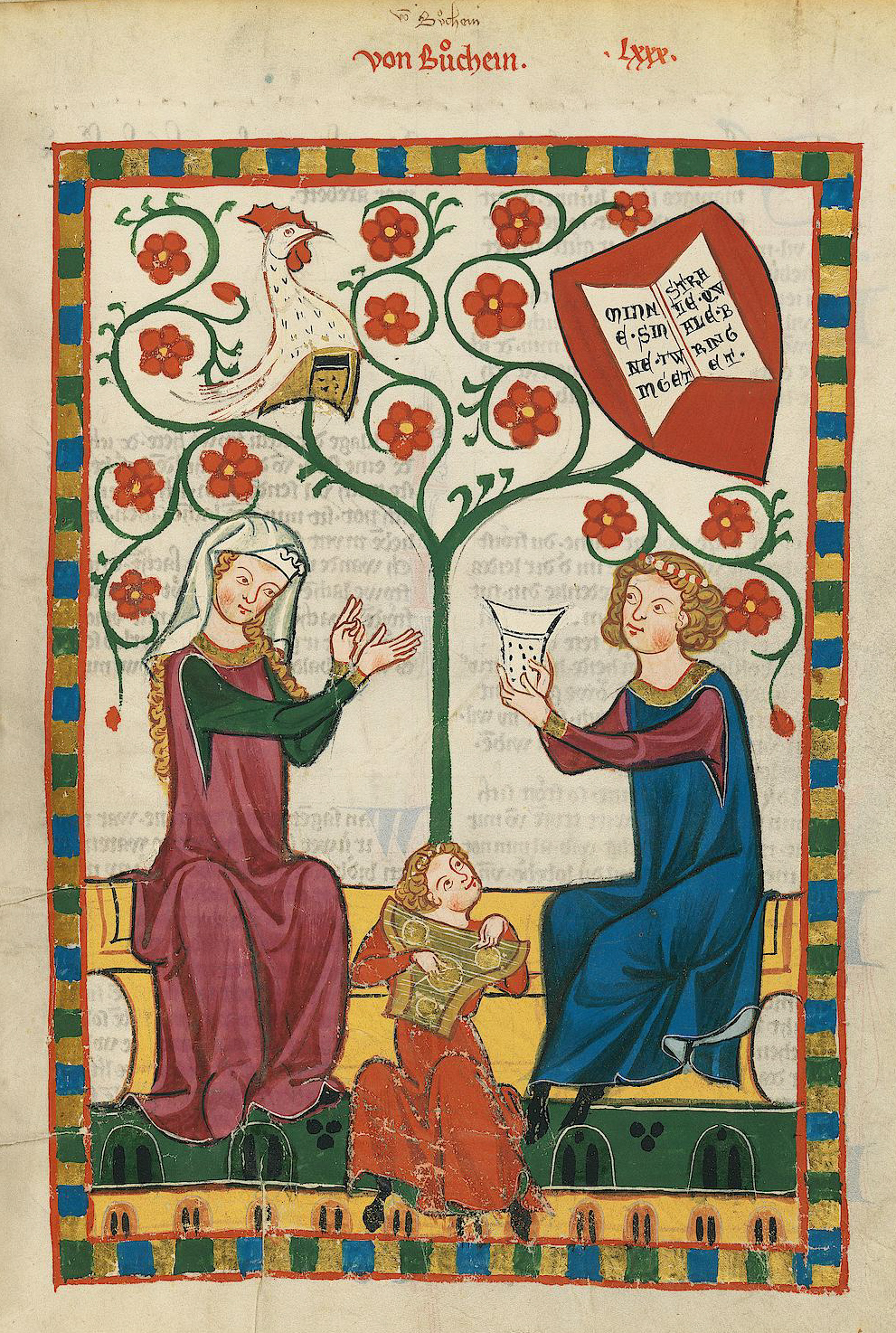 Codex Manesse, UB Heidelberg, Cod. Pal. germ. 848, fol. 271r: Von Buchheim